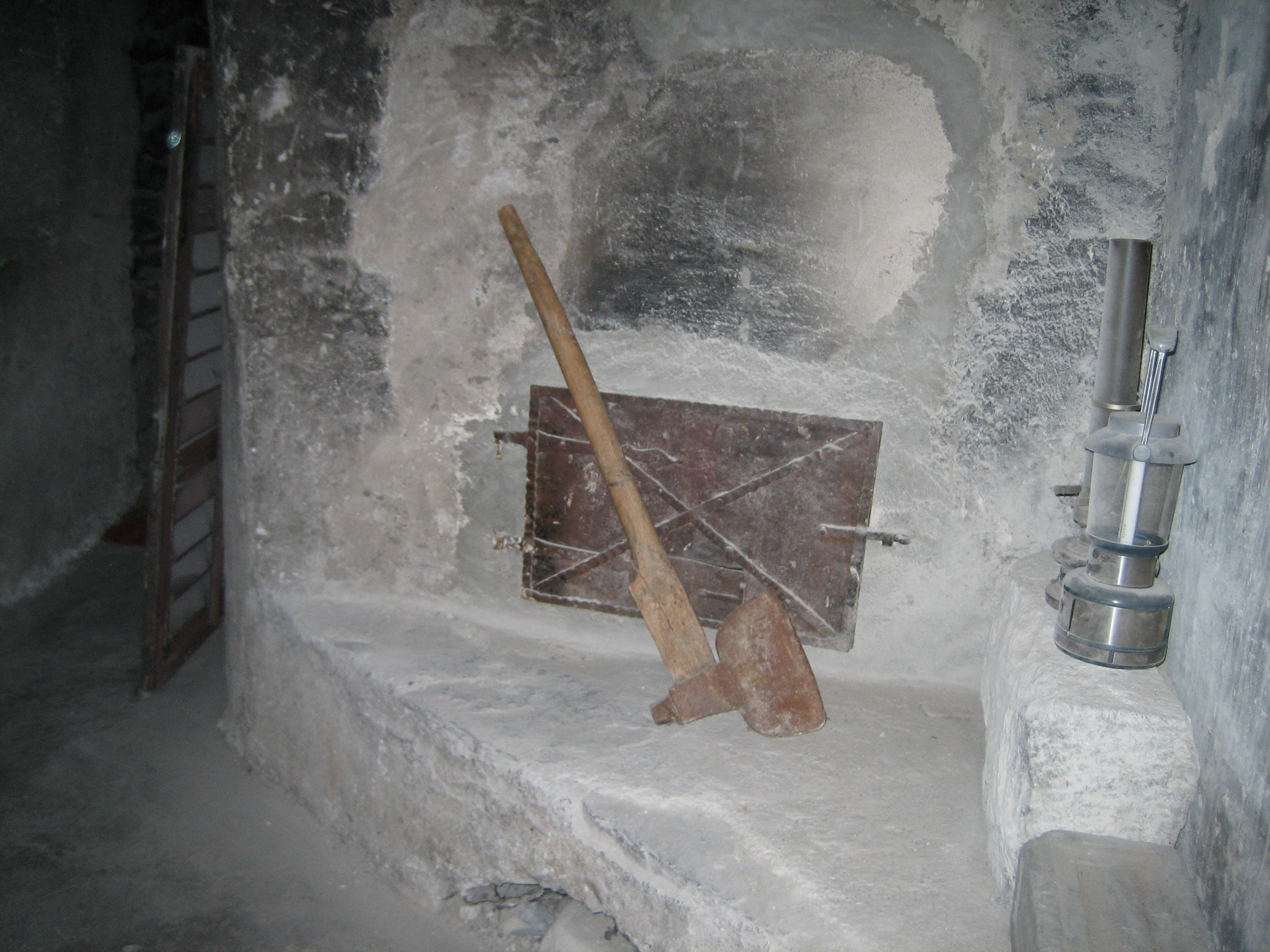 {Schloss Rietberg: Kamin, vor dem Pompejus Planta umgebracht wurde.